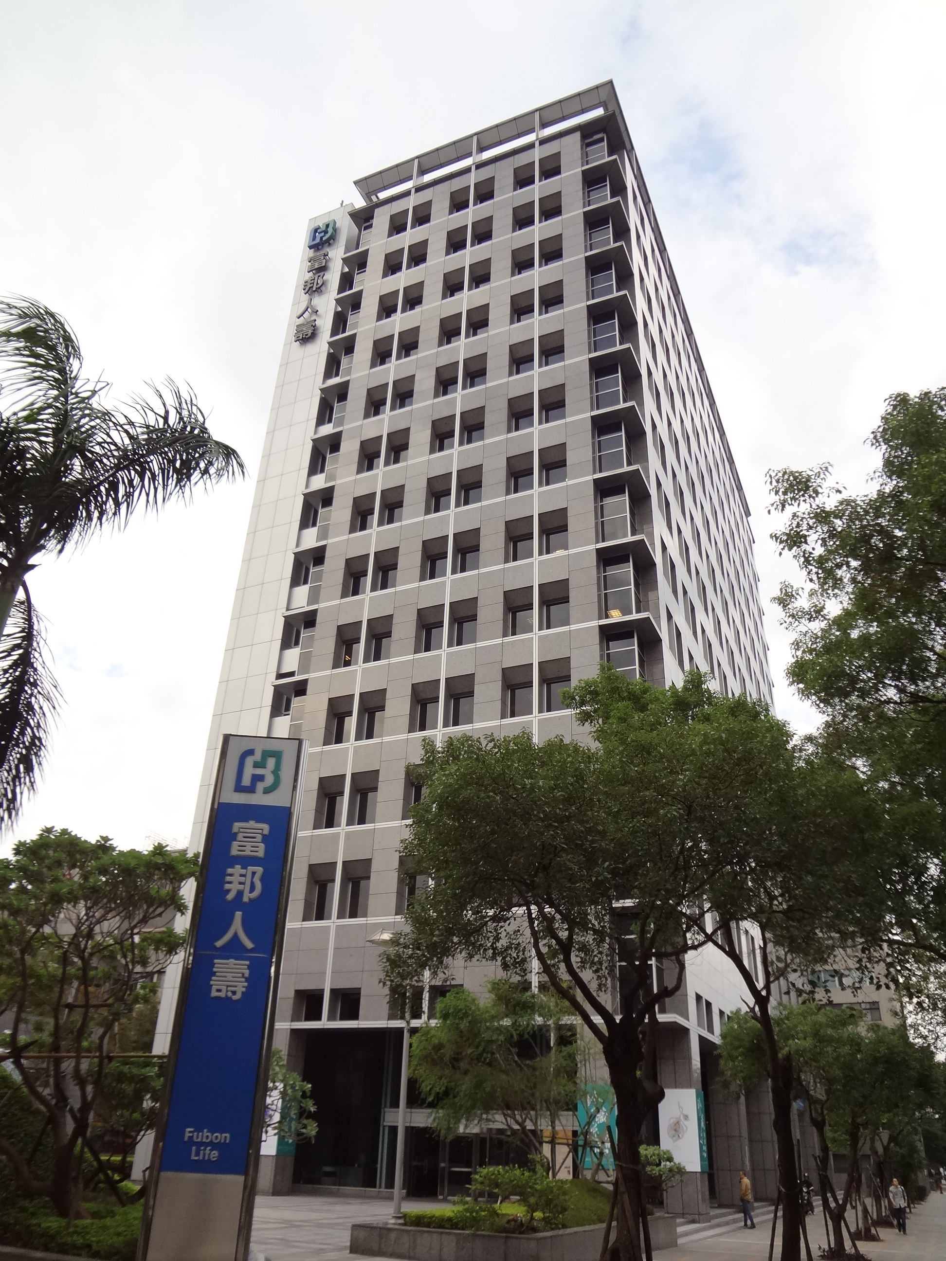 富邦人壽大樓，地址：臺北市松山區敦化南路一段108號。